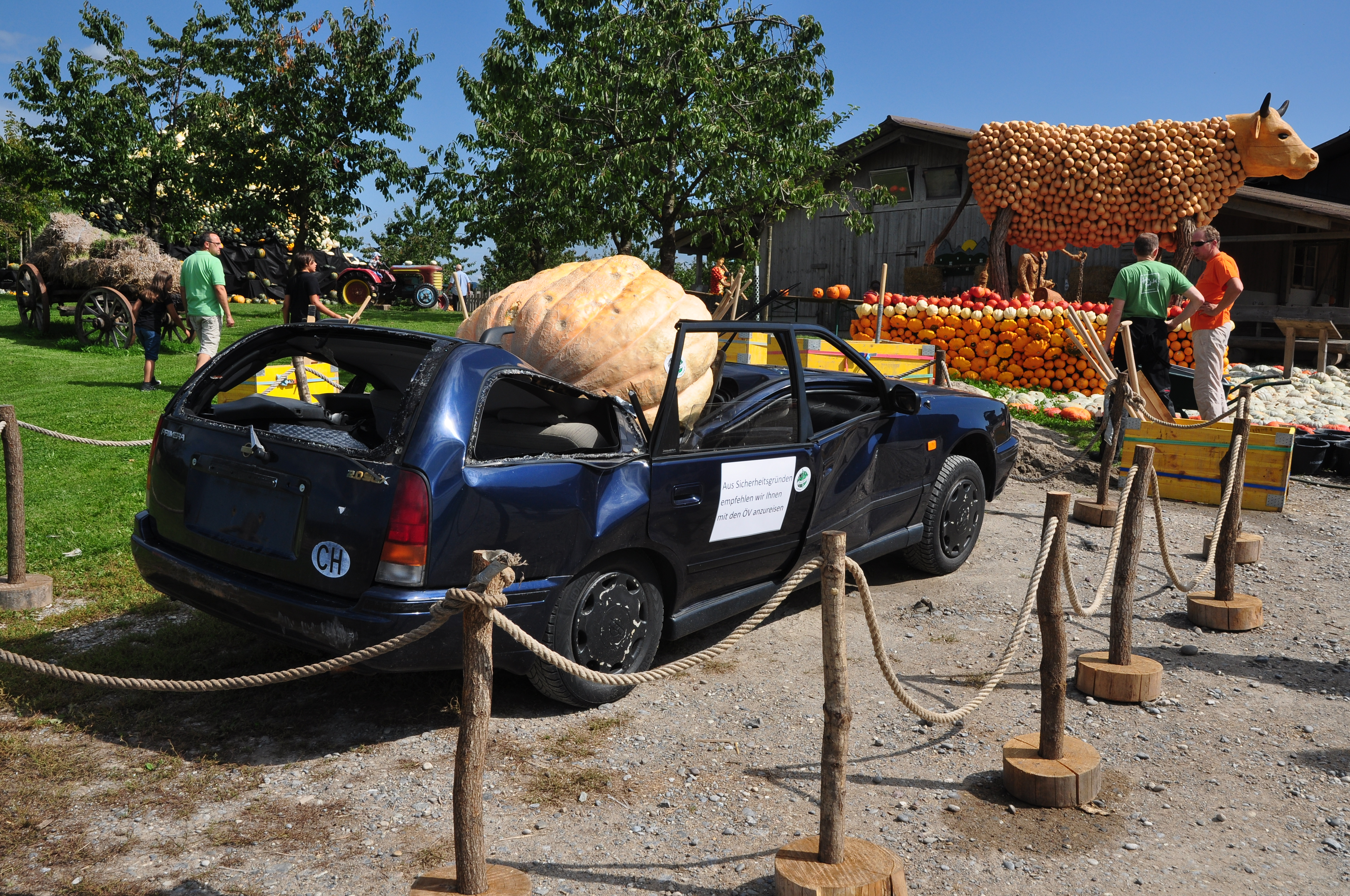 Kürbisausstellung, Jucker Farmart in Seegräben (Switzerland)